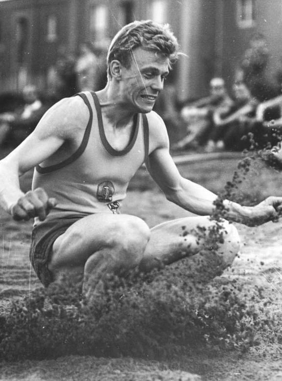 Rückborn Zentralbild Wendorf 14.7.1963 Berliner Leichtathletik-Meisterschaften Im Zeichen guter Leistungen der Spitzenathleten unserer Republik stand am 13.7.63 der erste Tag der Berliner Leichtathletik-Meisterschaften im Dynamo-Sportforum. UBz: Dreispringer Rückborn (ASK-Vorwärts)